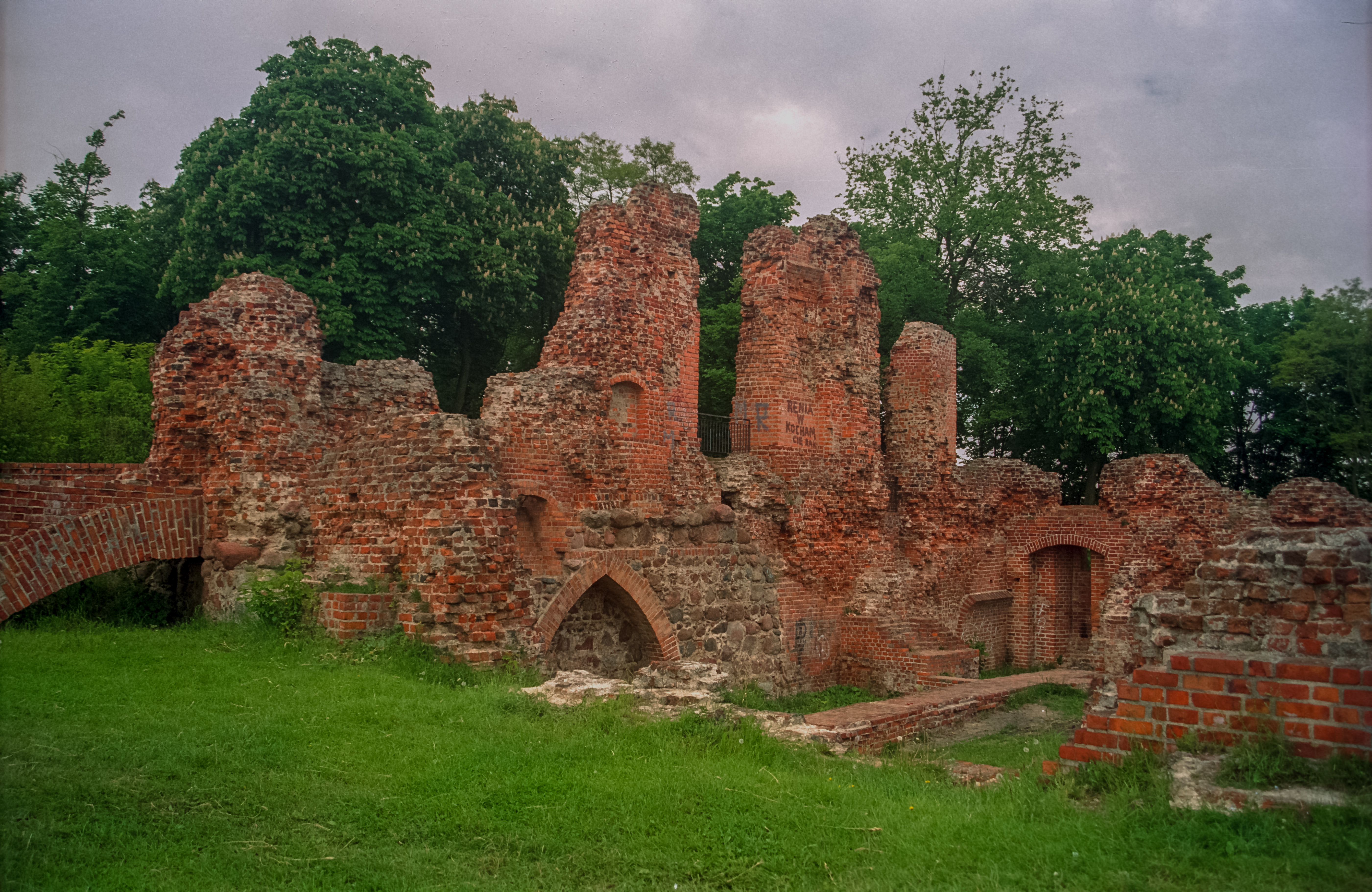 Raciążek, ruiny zamku